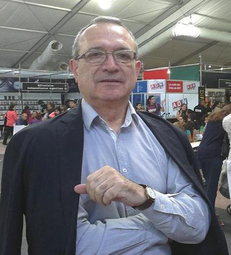 El poeta chileno Sergio Badilla en la en la Feria Internacional del Libro de Santiago 2013.